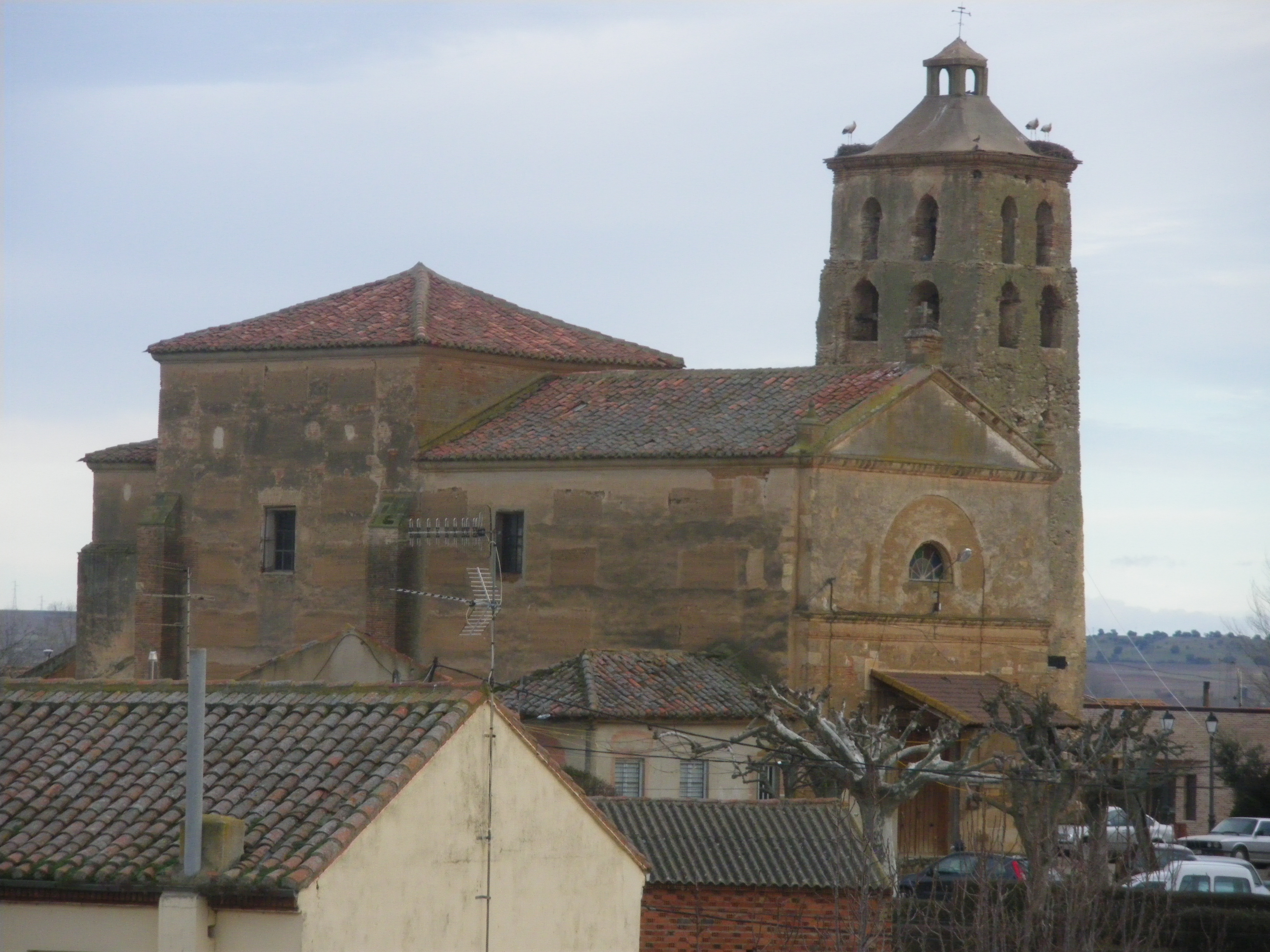 Iglesia de San Millan de los Caballeros,León